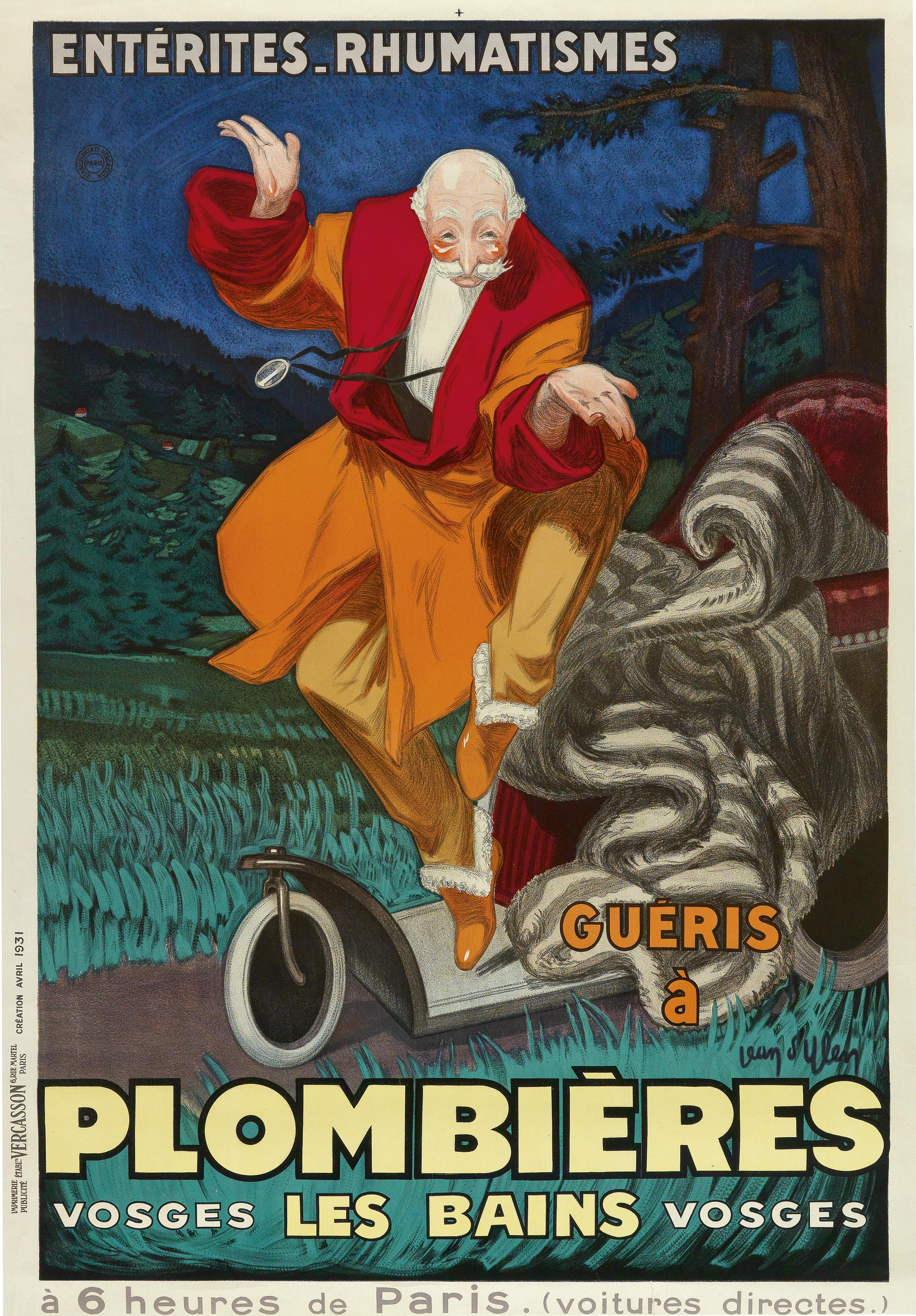 "Plombières". 77 x 107 cm. Druck: Vercasson, Paris